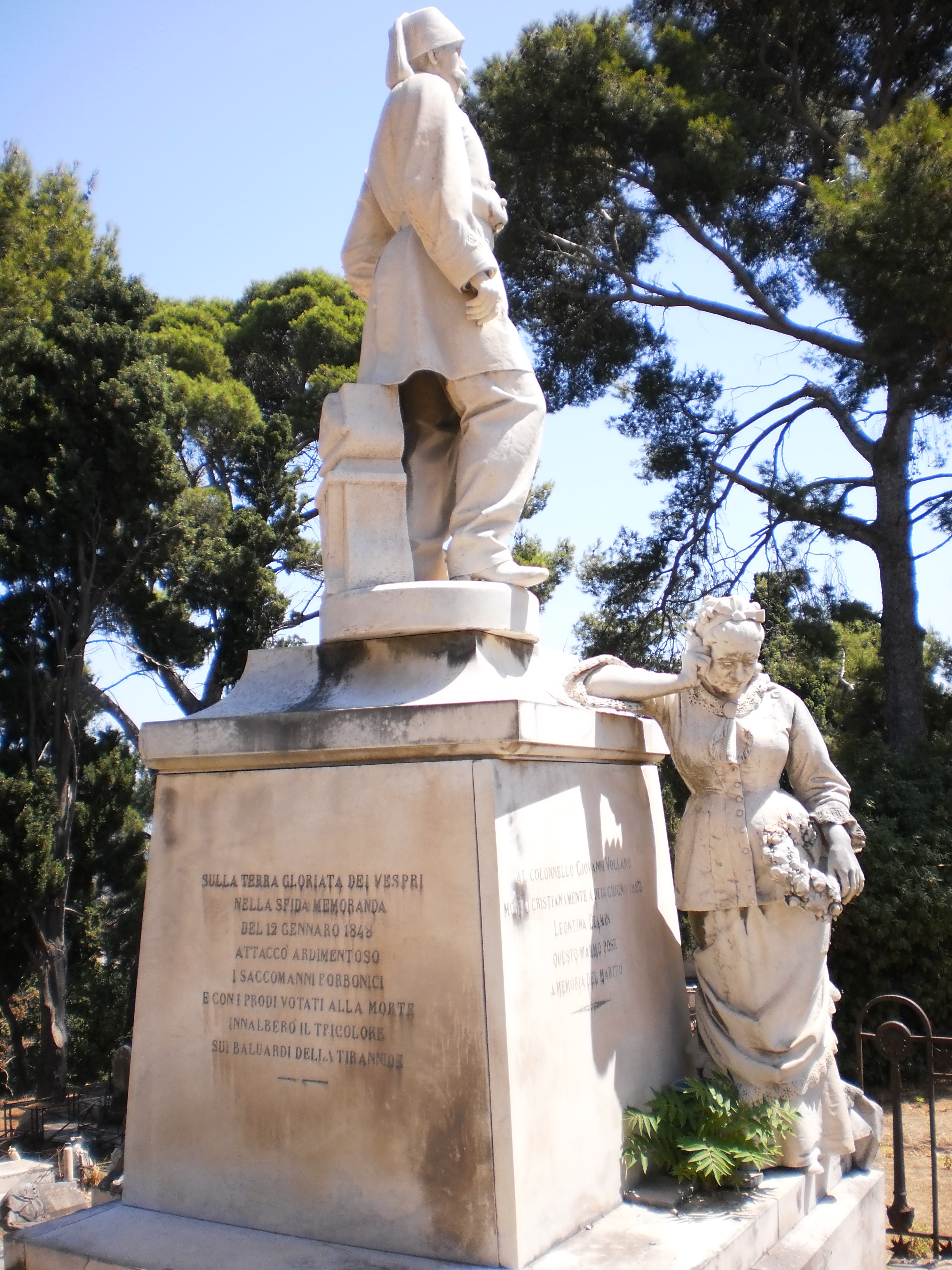 Monumento funerario del colonnello Vollaro